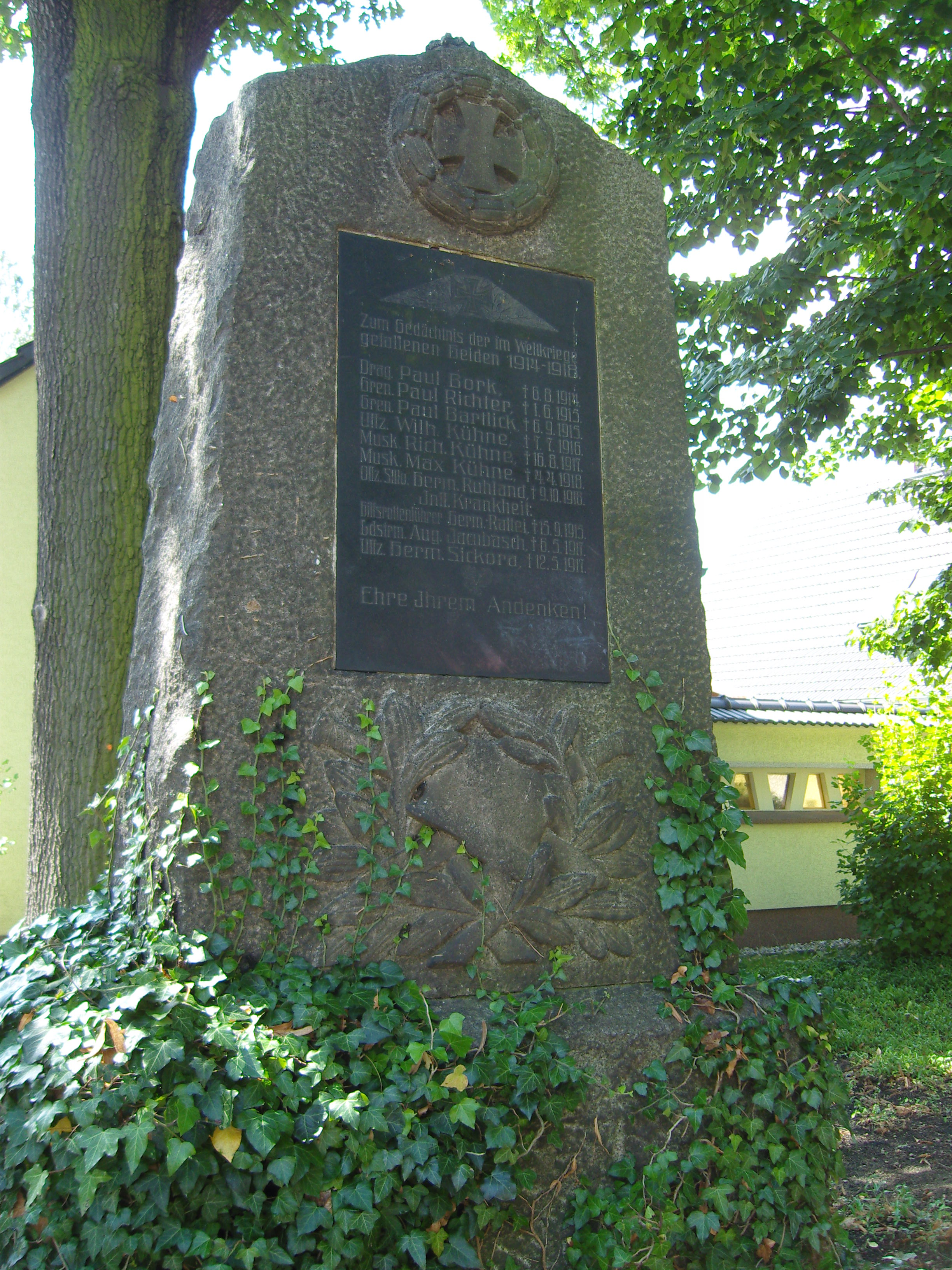 Kriegerdenkmal für die Gefallenen des Ersten Weltkrieg in Senftenberg - Stadtteil Buchwalde